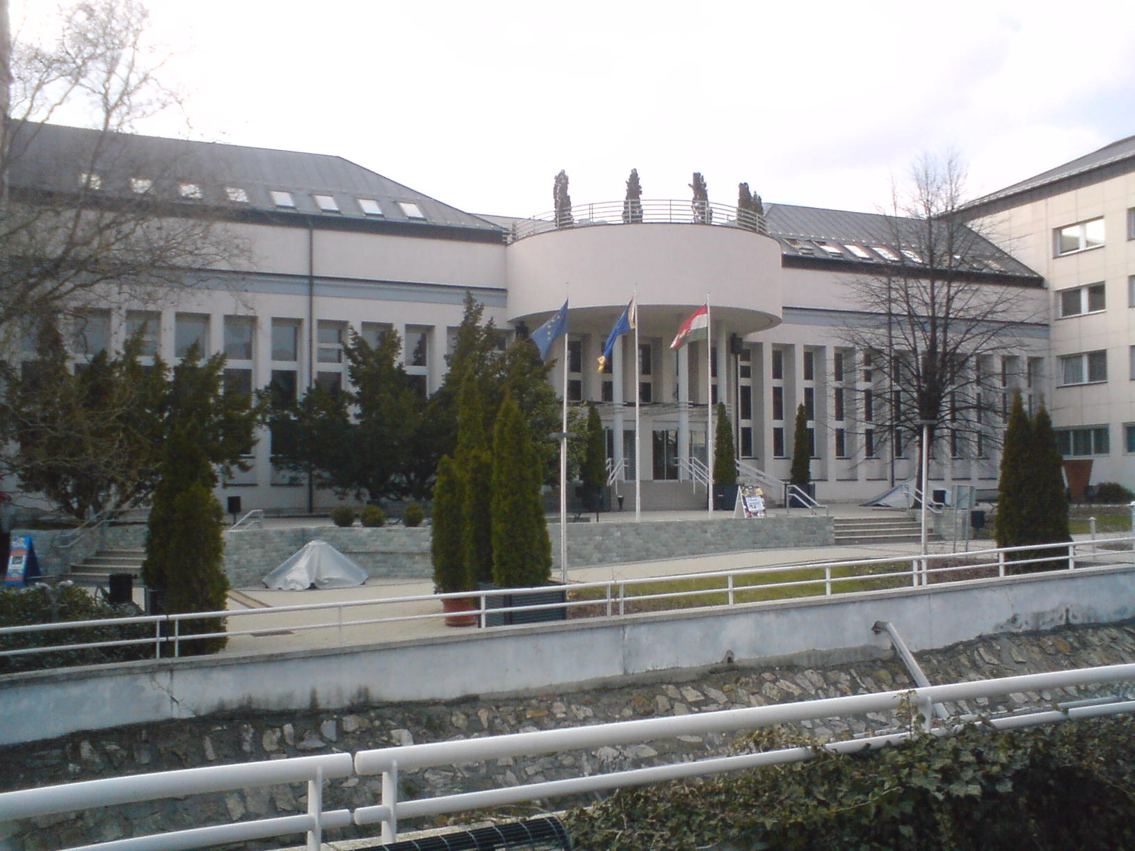 KRF